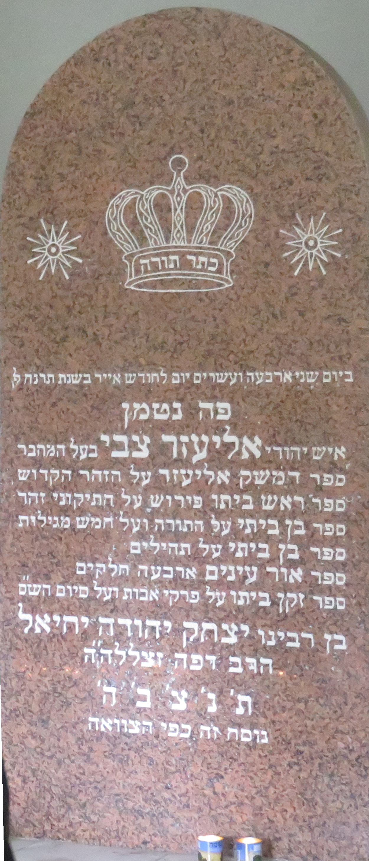 Lasar Safrin